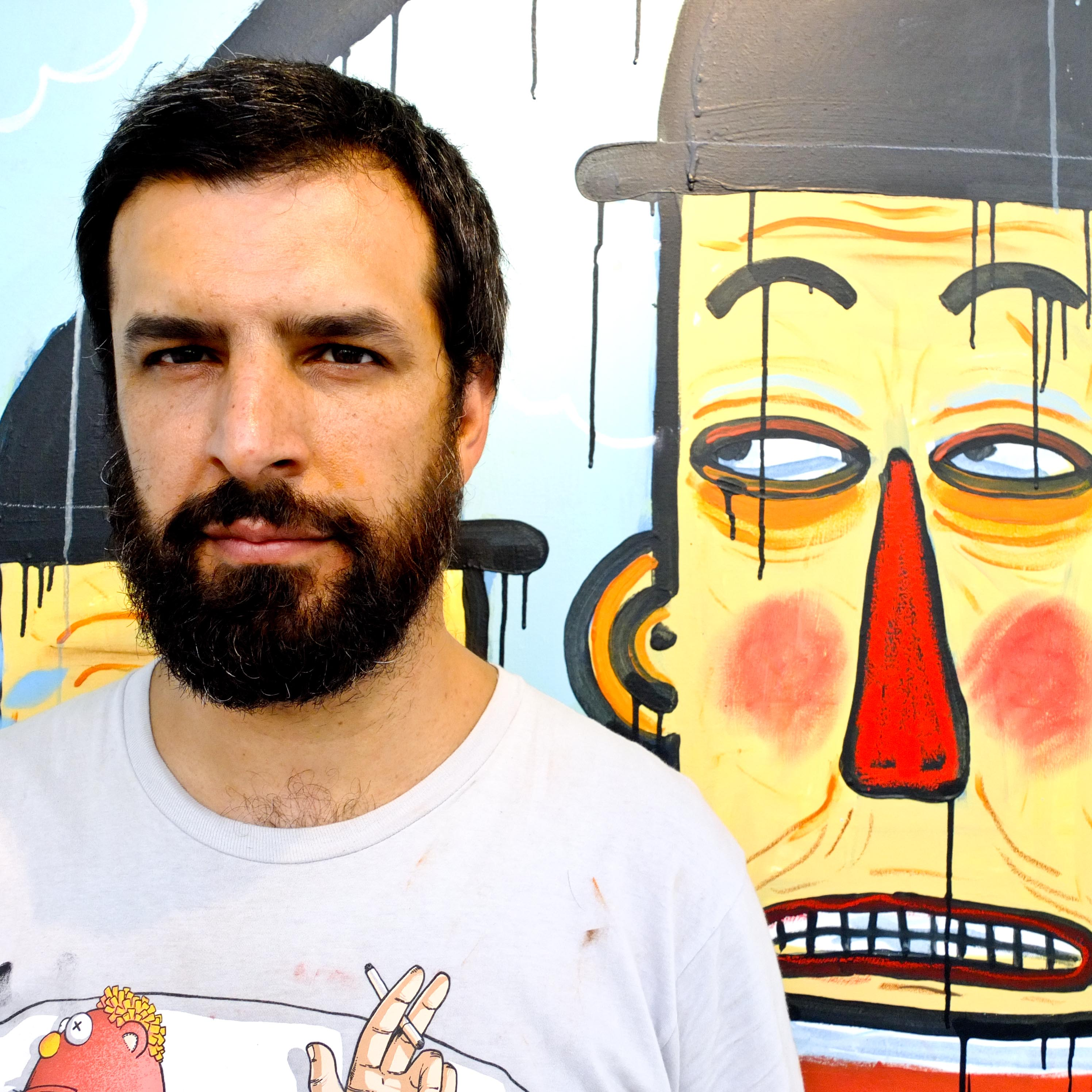 Alberto Montt durante el montaje de "Extraños placeres de la gente”, 13 de enero de 2012.